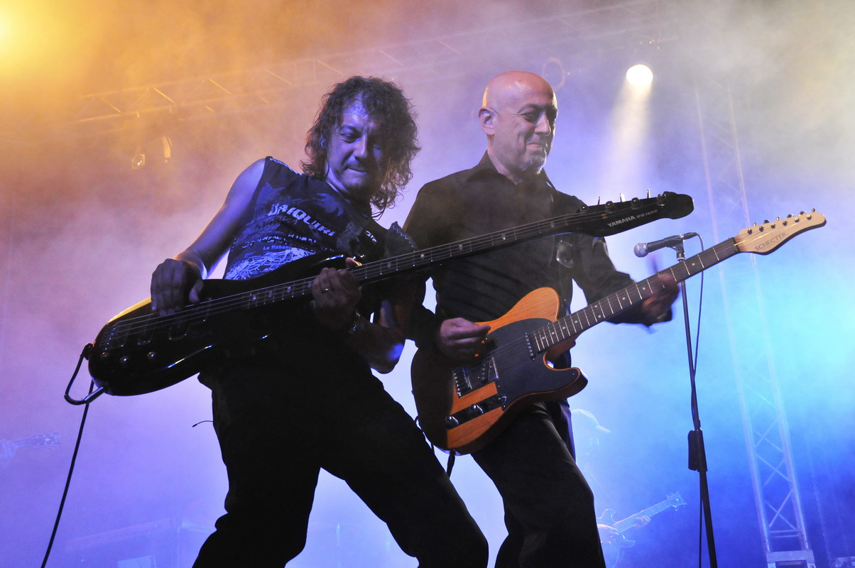 Enrico Ruggeri in concerto